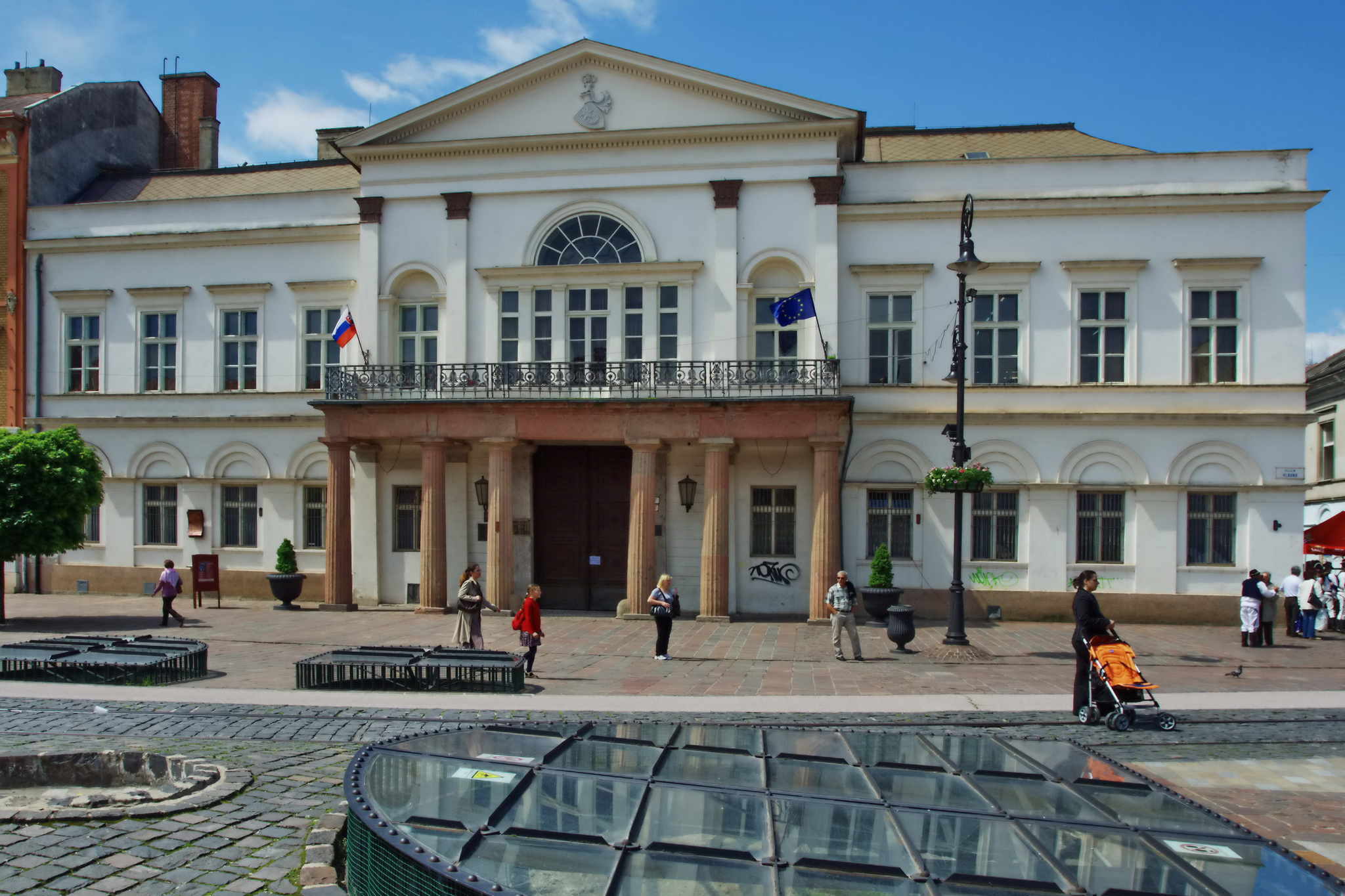 Pongrácovsko-forgáčovský palác, Košice